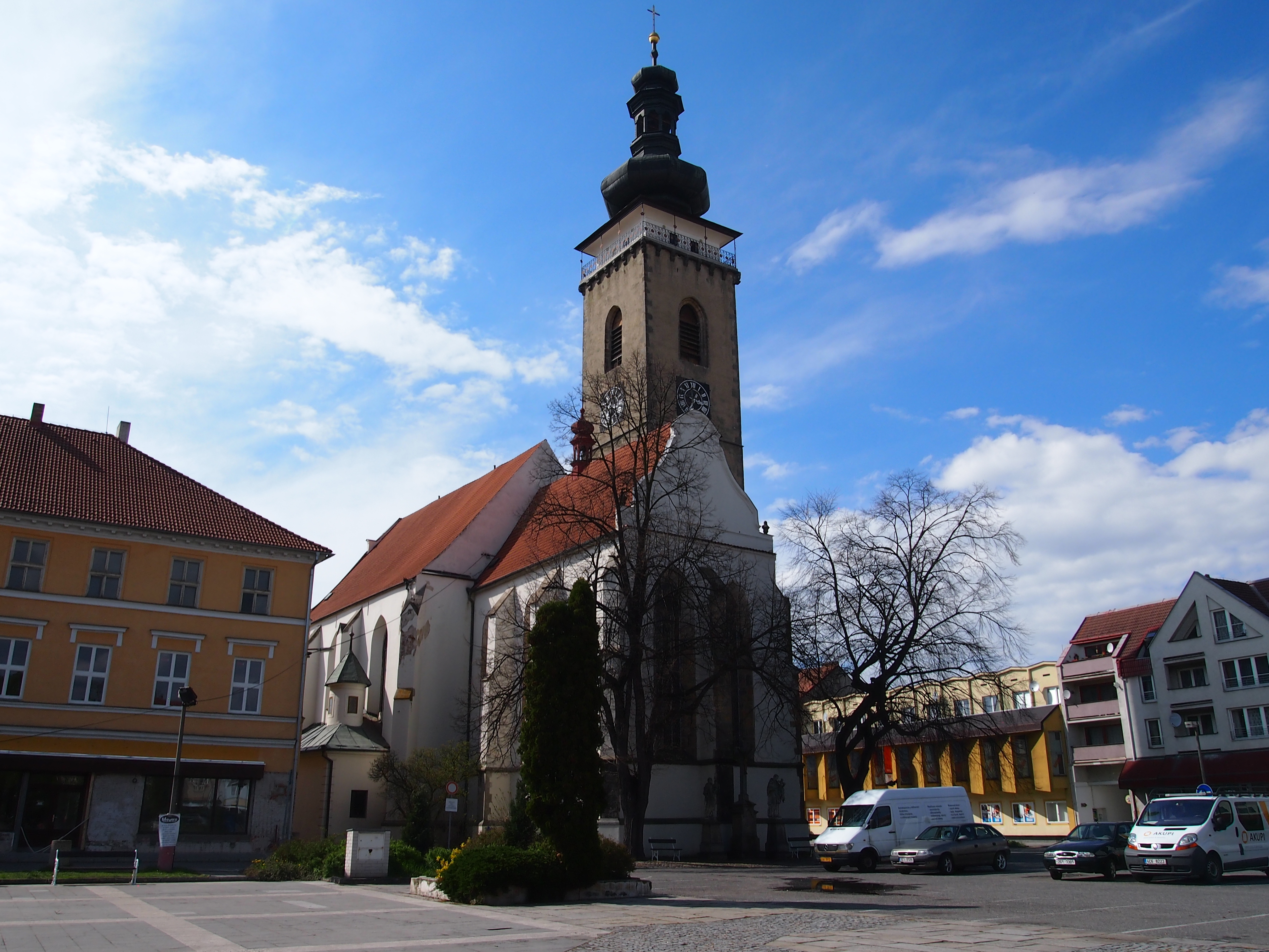 Kostel_svateho_Petra-a-Pavla_3